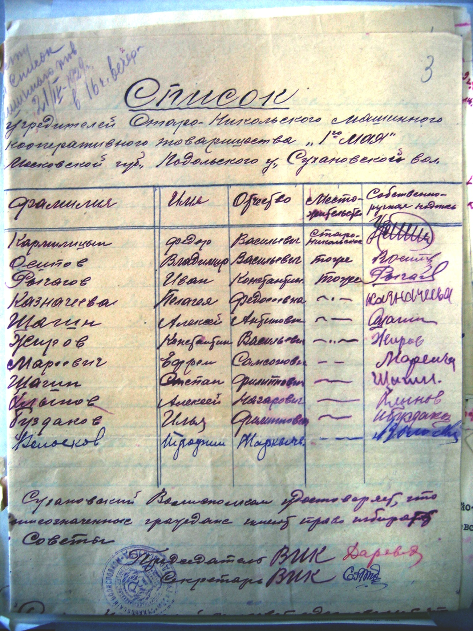 Arhive document. From public documents Staro-Nikolskaya village.